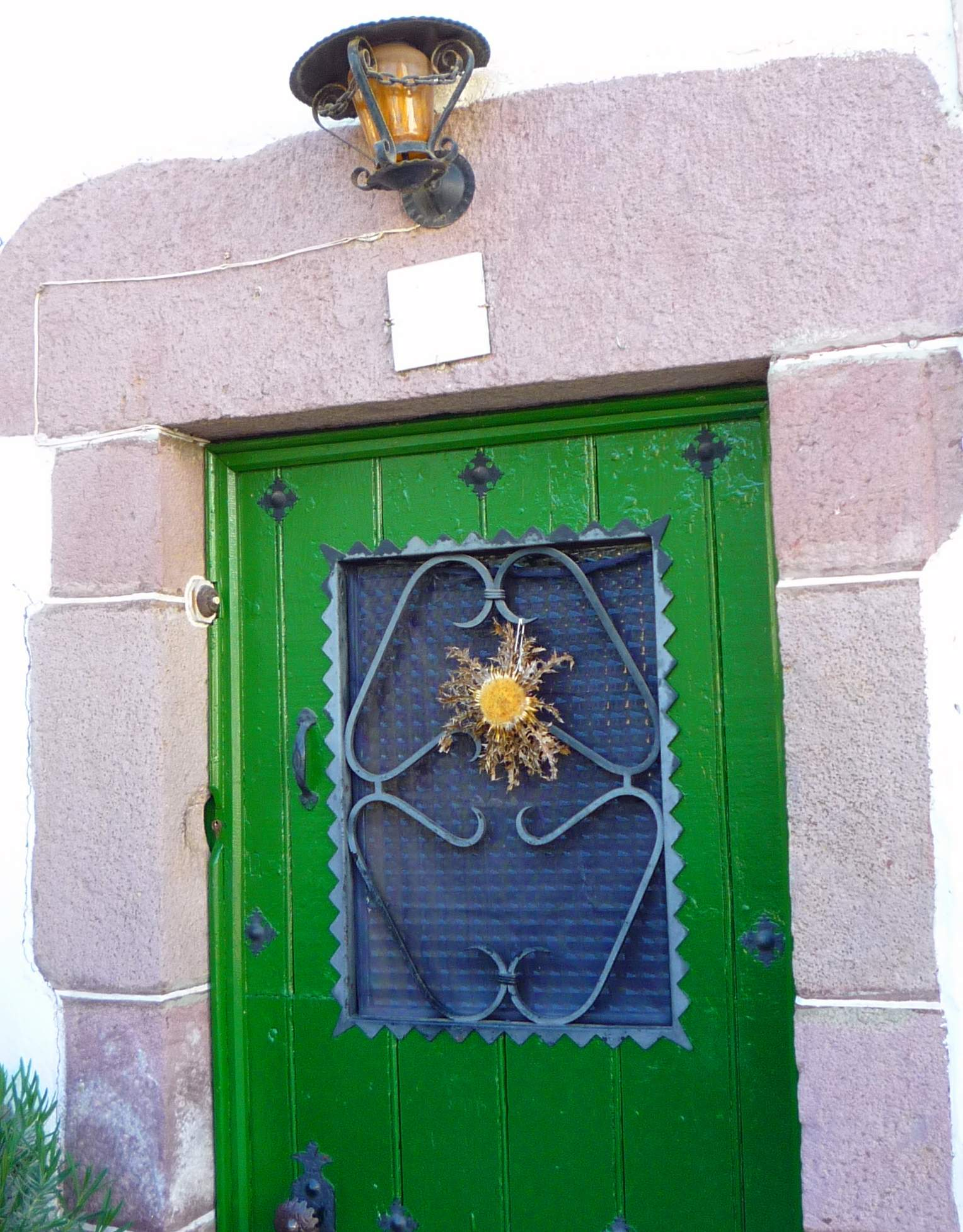 Elbete (Baztán, Navarra)